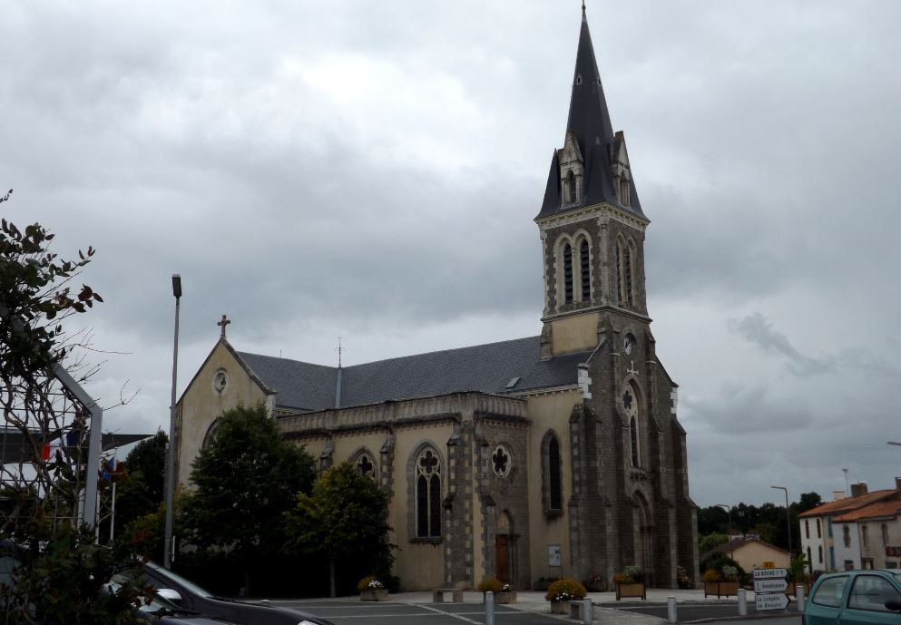 L'église de mouilleron